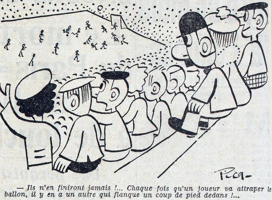 La finale de la Coupe du monde de football vue par les français, en juin 1938.